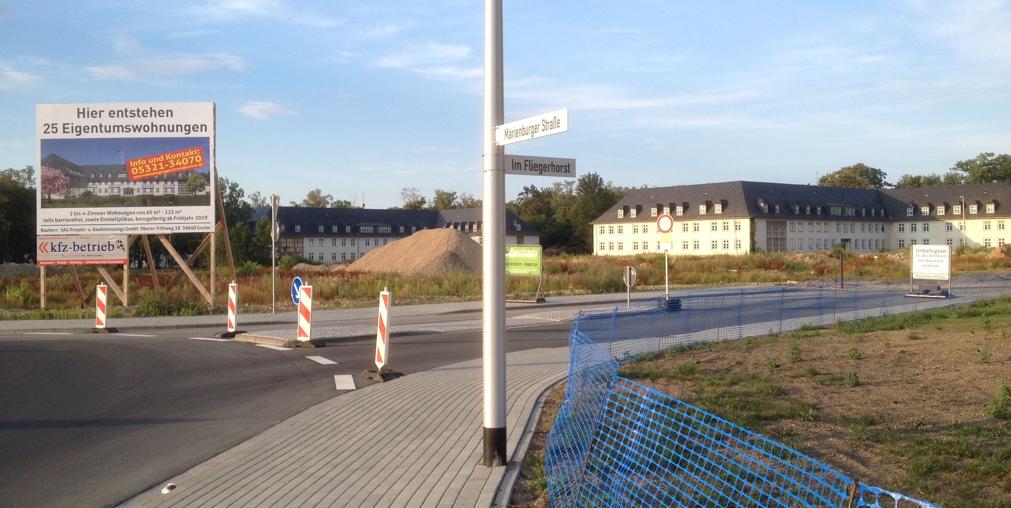 Fliegerhorst Goslar, Juli 2018, Einmündung der verlängerten Marienburger Straße in die neue Straße Im Fliegerhorst (Kreisverkehr)